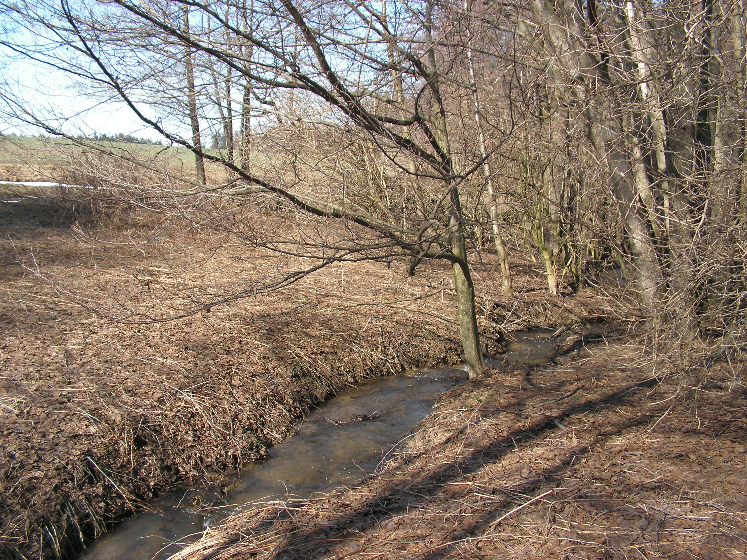 Česky: Dědický potok je pravostranný přítok Senetínského potoka v okrese Kutná Hora. Foceno na okraji lesa severně od Dědic.